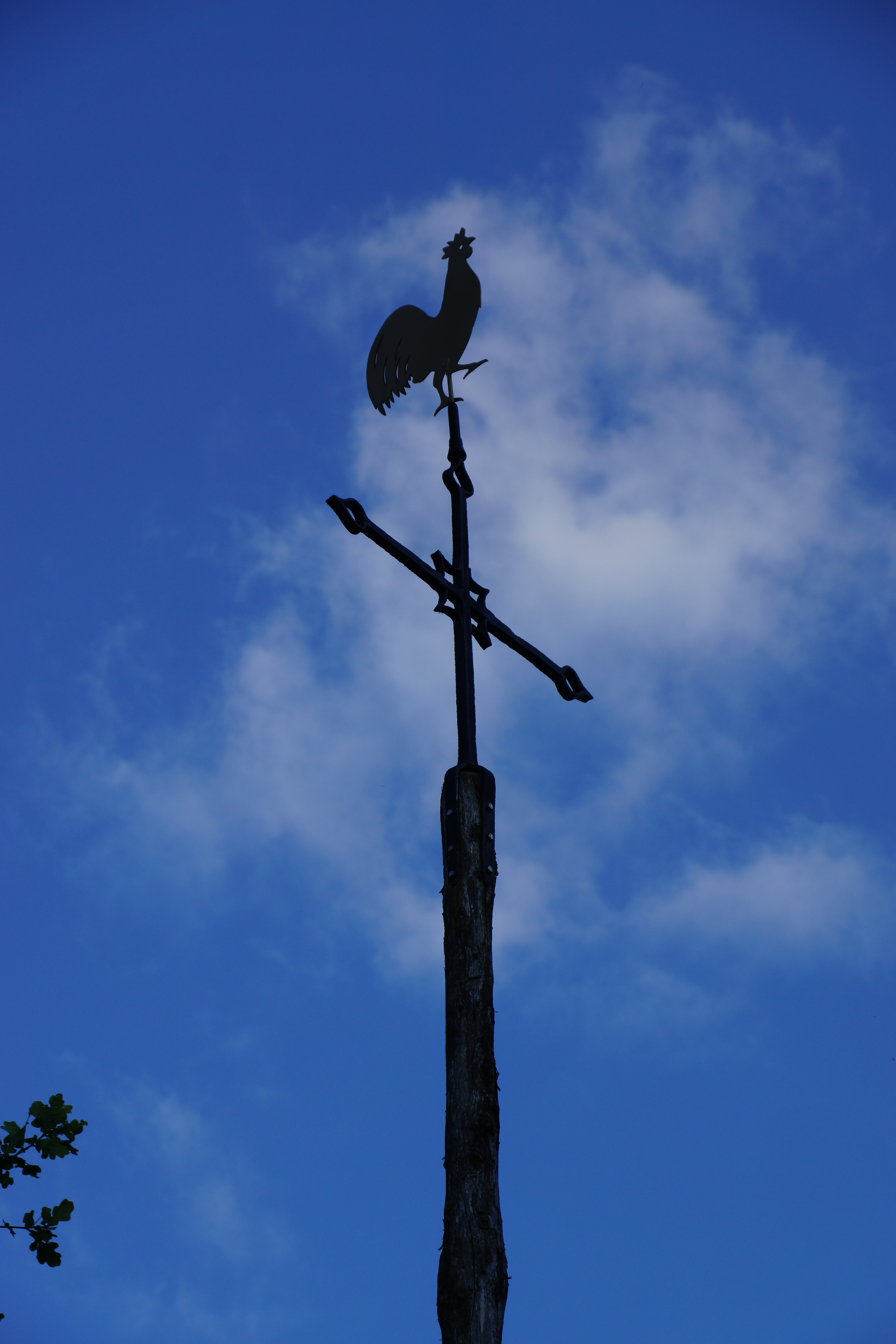 Hagelkruis Wehl 150615 (6)